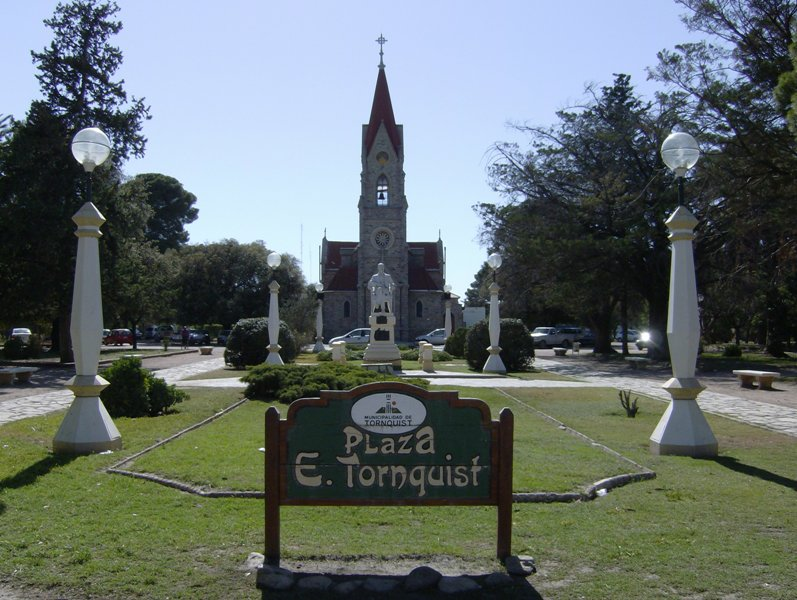 Tornquist, Buenos Aires Province, Argentina